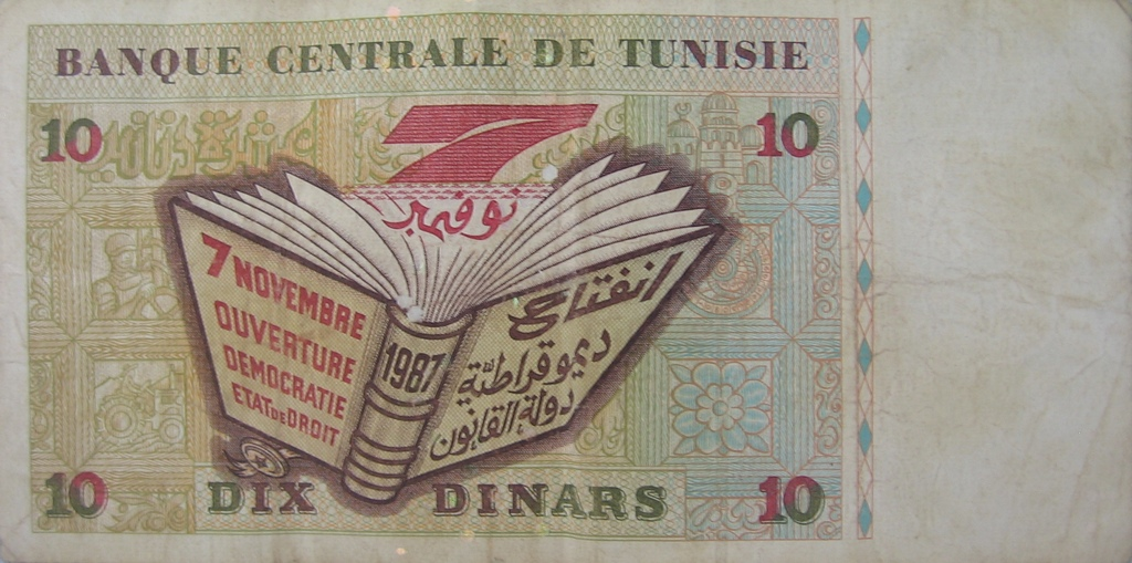 10 dinarów tunezyjskich - rewers